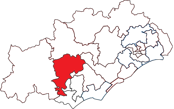 Situation du canton dans le département de l'Hérault